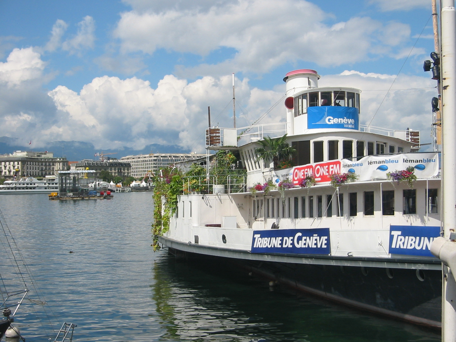 Bateau dans la rade de Genève, août 2006.